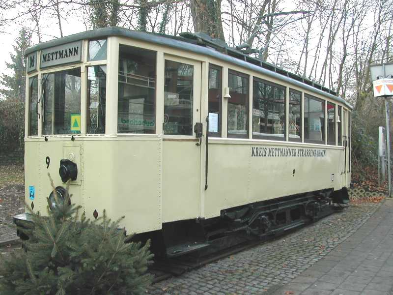 Denkmal der Mettmanner Straßenbahn in Mettmann Ecke Breitestraße/Am Königshof, selbst fotografiert am 3.1.2006